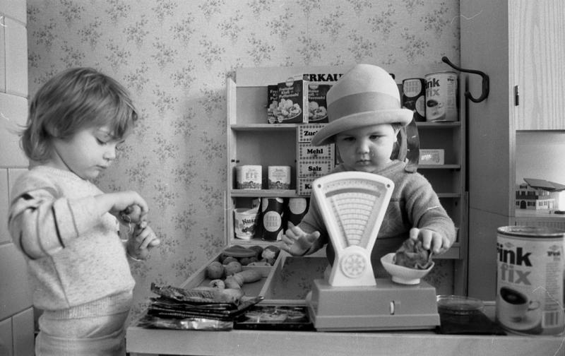 Kindergarten, Kinder beim Spiel ADN-ZB/Ludwig/18.2.88/Bez. Erfurt: Der Nachwuchs ist in den Startlöchern - mit dieser Gewißheit können die Mitarbeiter des Handels beruhigt ihren Ehrentag am 21.2. feiern. (Beobachtet im Kindergarten "Max und Moritz" in Tüttleben, Kreis Gotha, den Monique Gaudel (r.) und Michael Schlöffel besuchen).